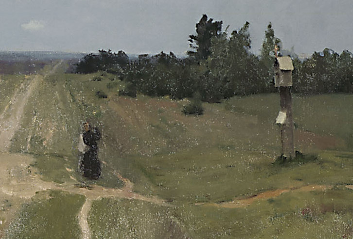 Левитан. Владимирка. Версия без рамки.